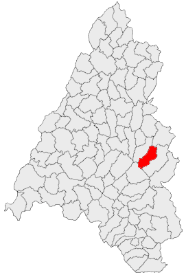 Categorie:Hărţi ale judeţului Bihor